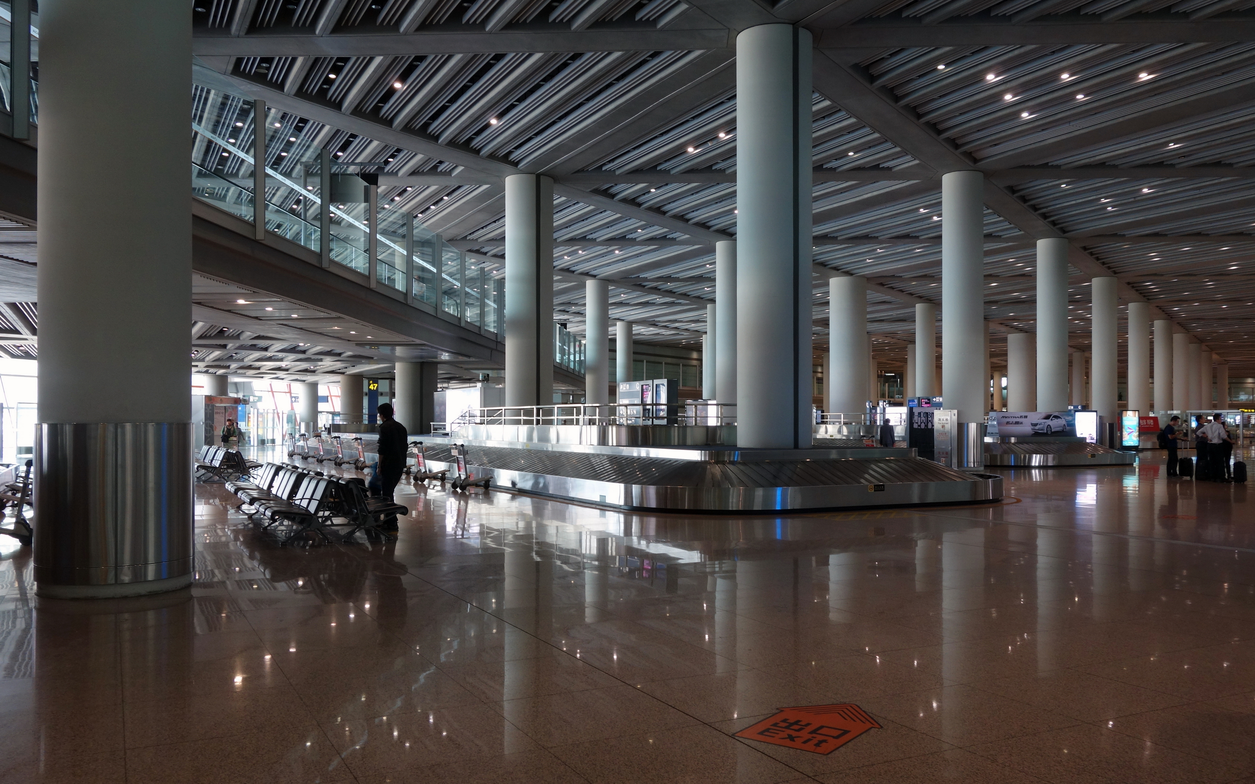 北京首都国际机场3号航站楼行李提取大厅